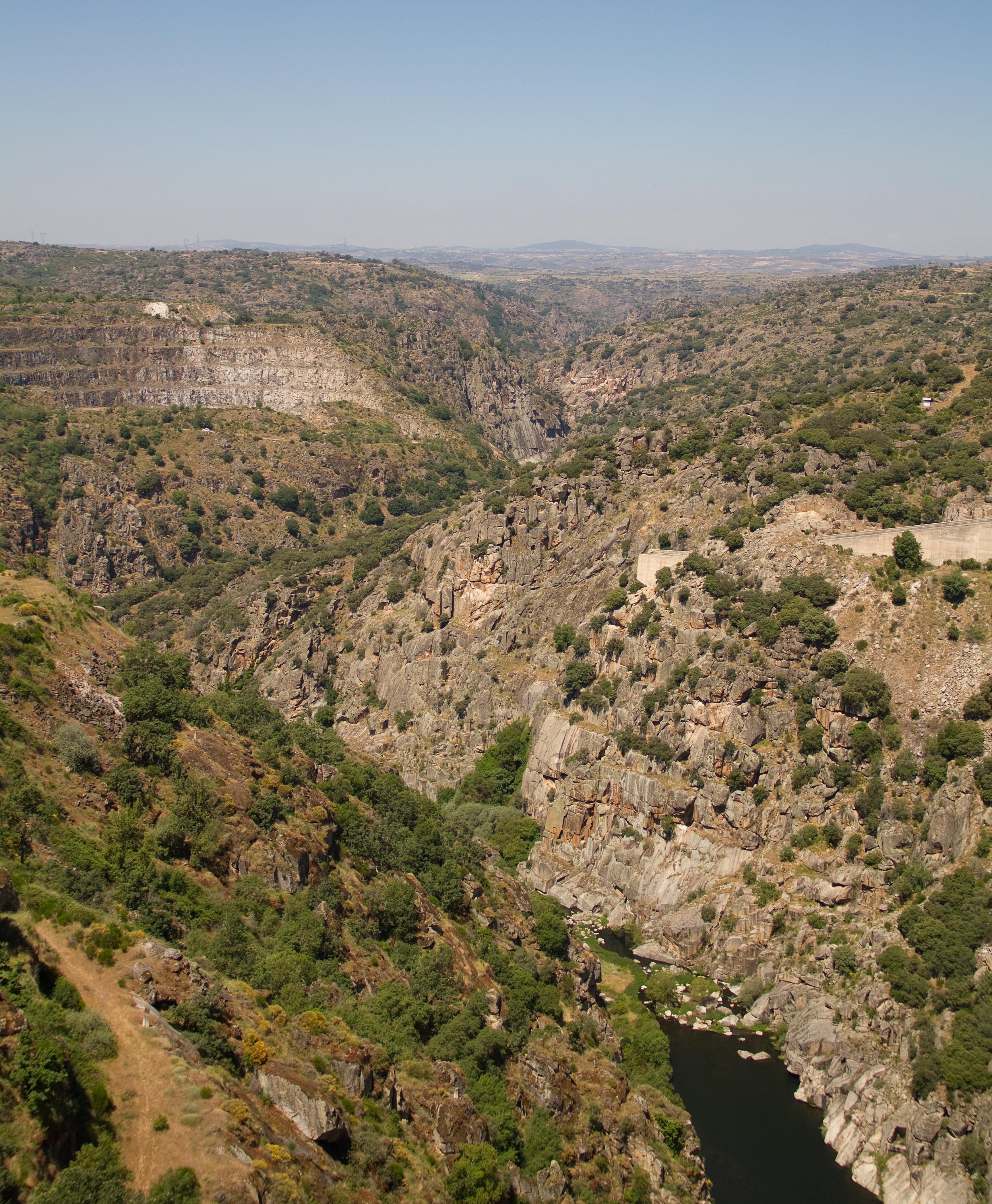 Vista de los Arribes del Tormes desde el mirador de la presa de Almendra, en el Parque Natural de Arribes del Duero, España.